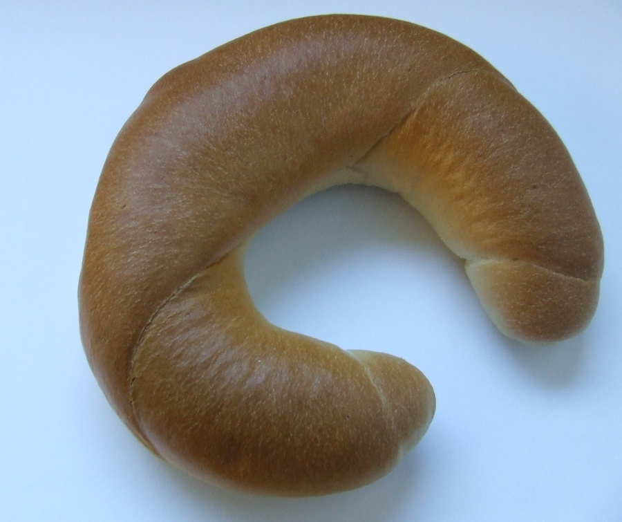 "Gipfele" ca. 15,5 cm Durchmesser; Aufnahme in Südtirol